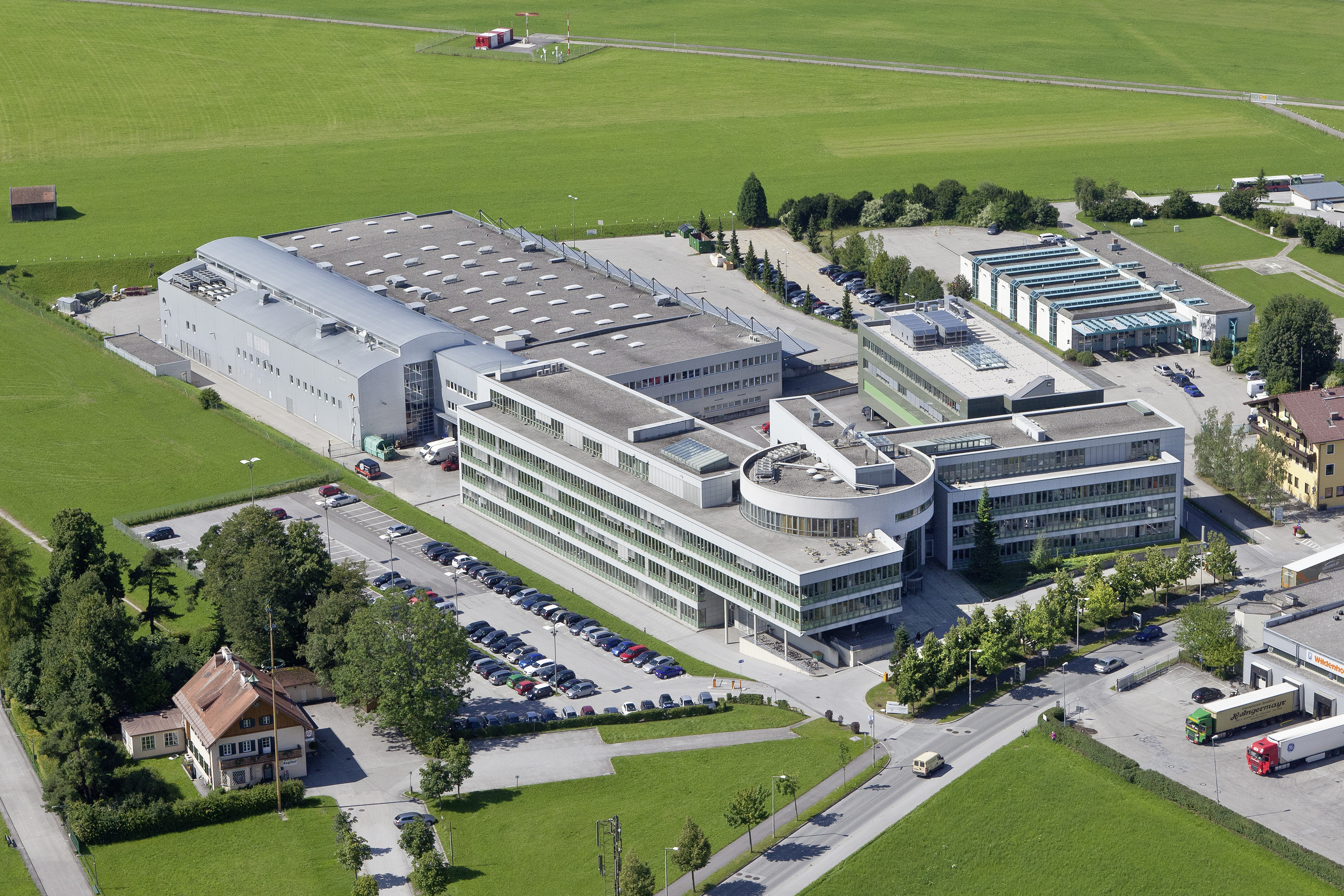 Luftaufnahme des Pressezentrums Salzburg. Bild: SN/ Robert Ratzer